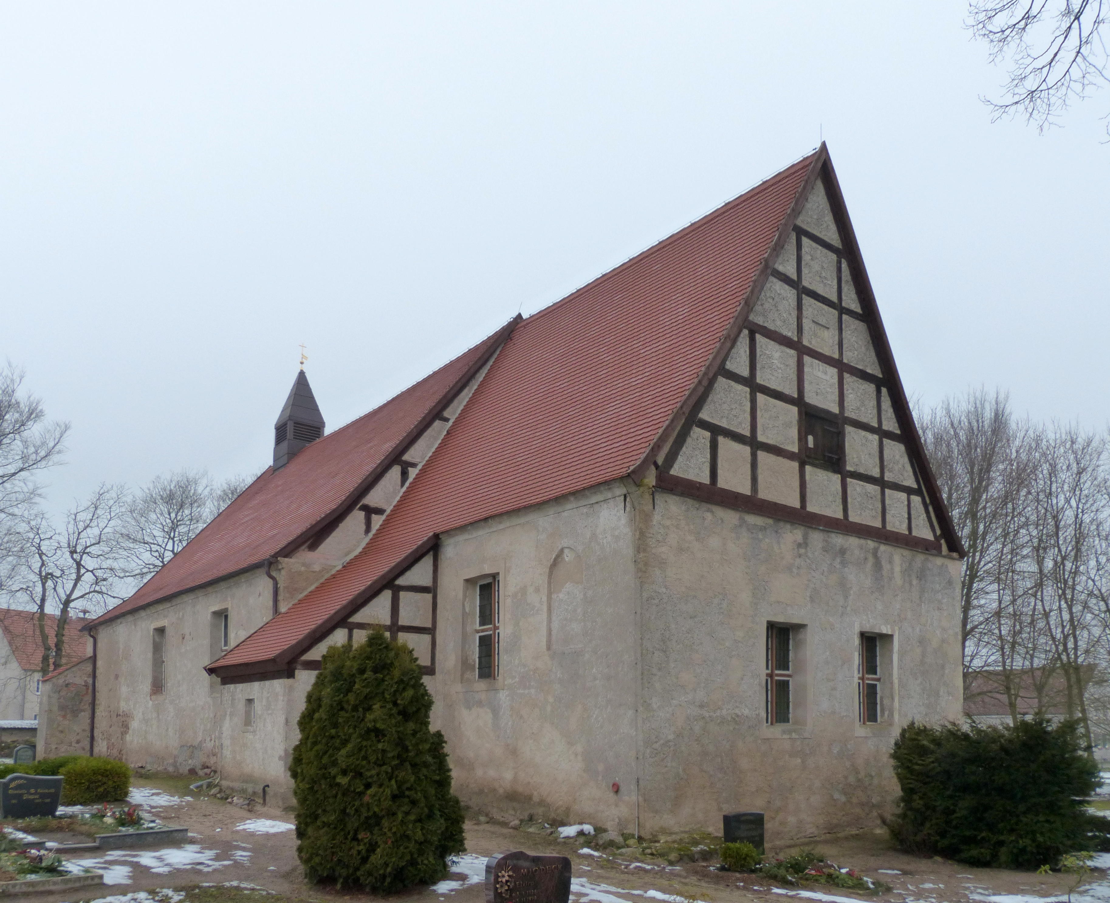 Kirche in Rathebur, Ansicht von Südosten